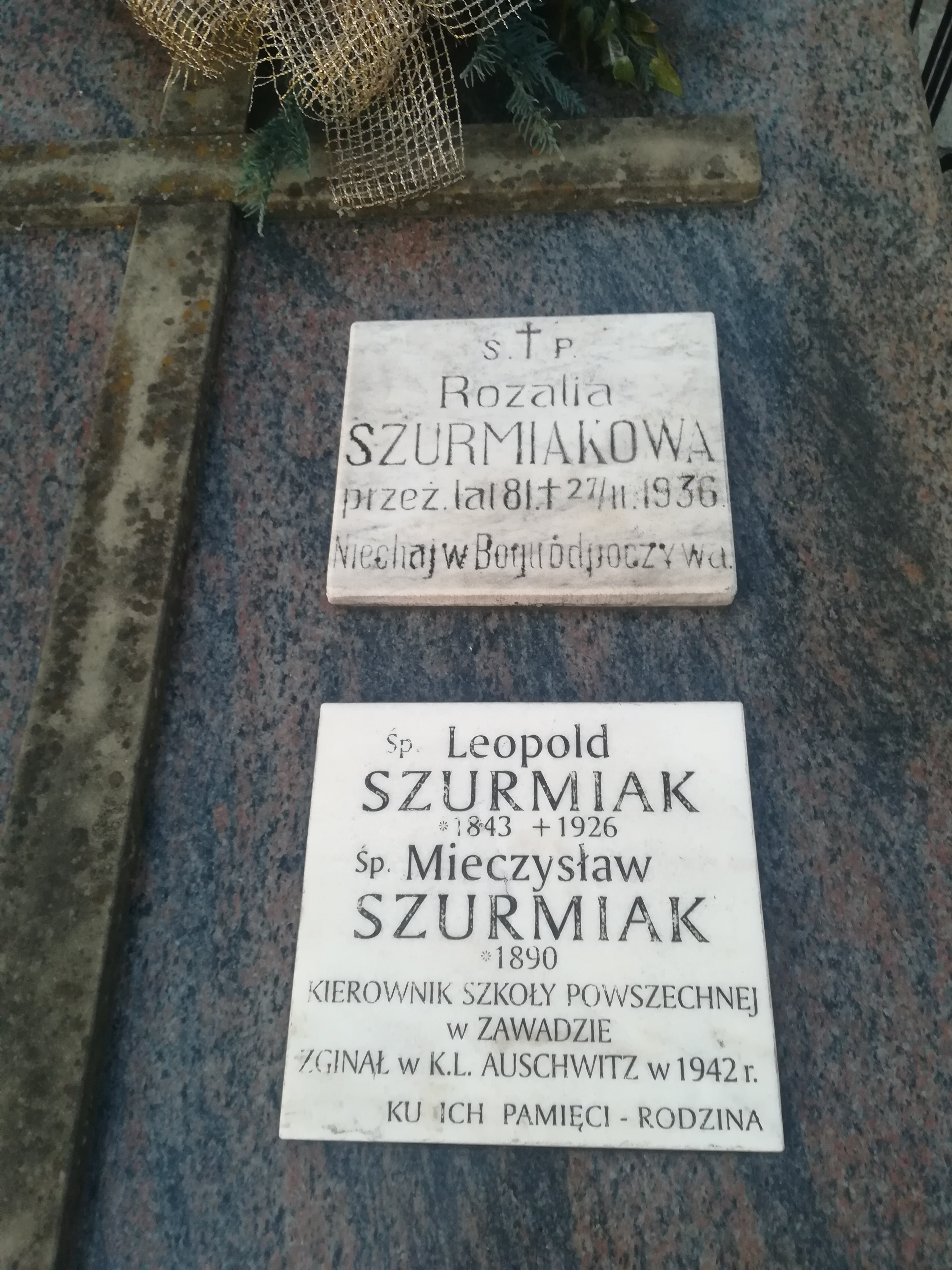 Cmentarz parafialny w Nowym Sączu (Zawada).